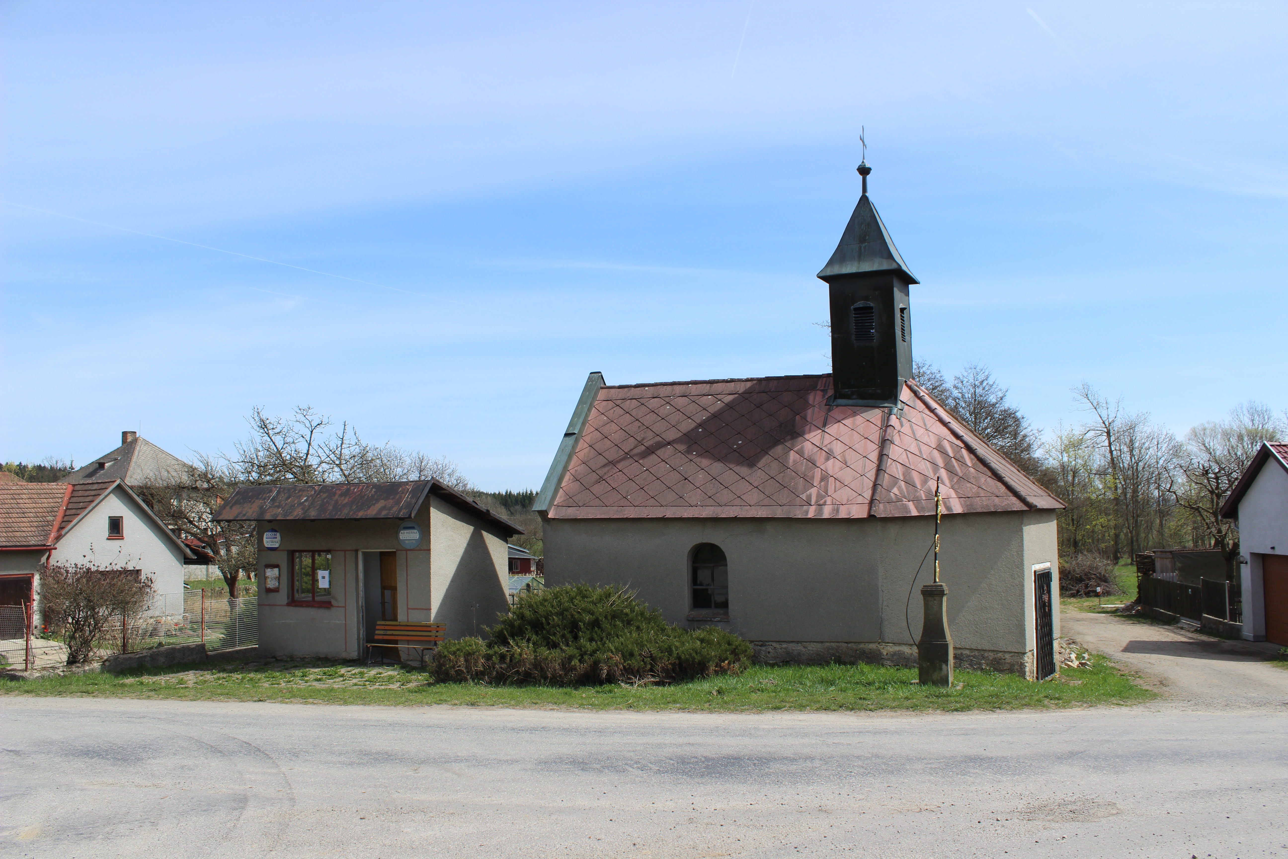 Kaplička a čekárna na zastávce autobusu v Čejkově, části Nového Rychnova. Project: Fotíme Česko.